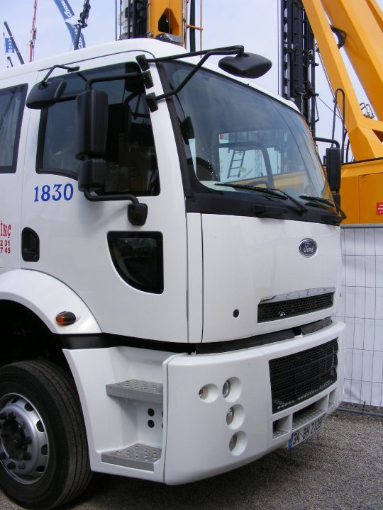 In der Türkei hergestellter Ford Cargo auf der Bauma 2010.